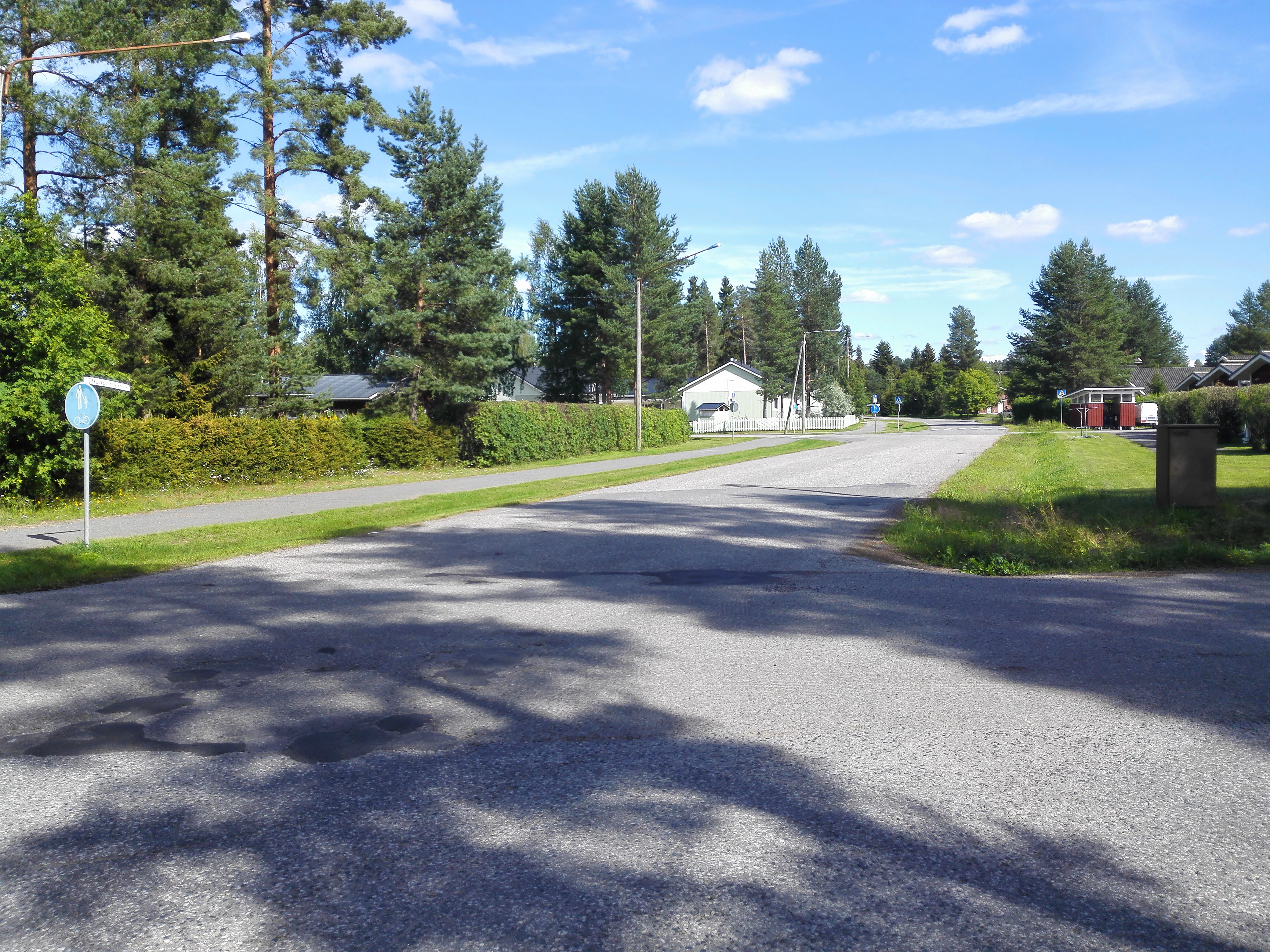 Näkymä Kempeleen Haapamaan asuinalueelle Haapamaantien, Pekurintien ja Marjatien risteyksestä.